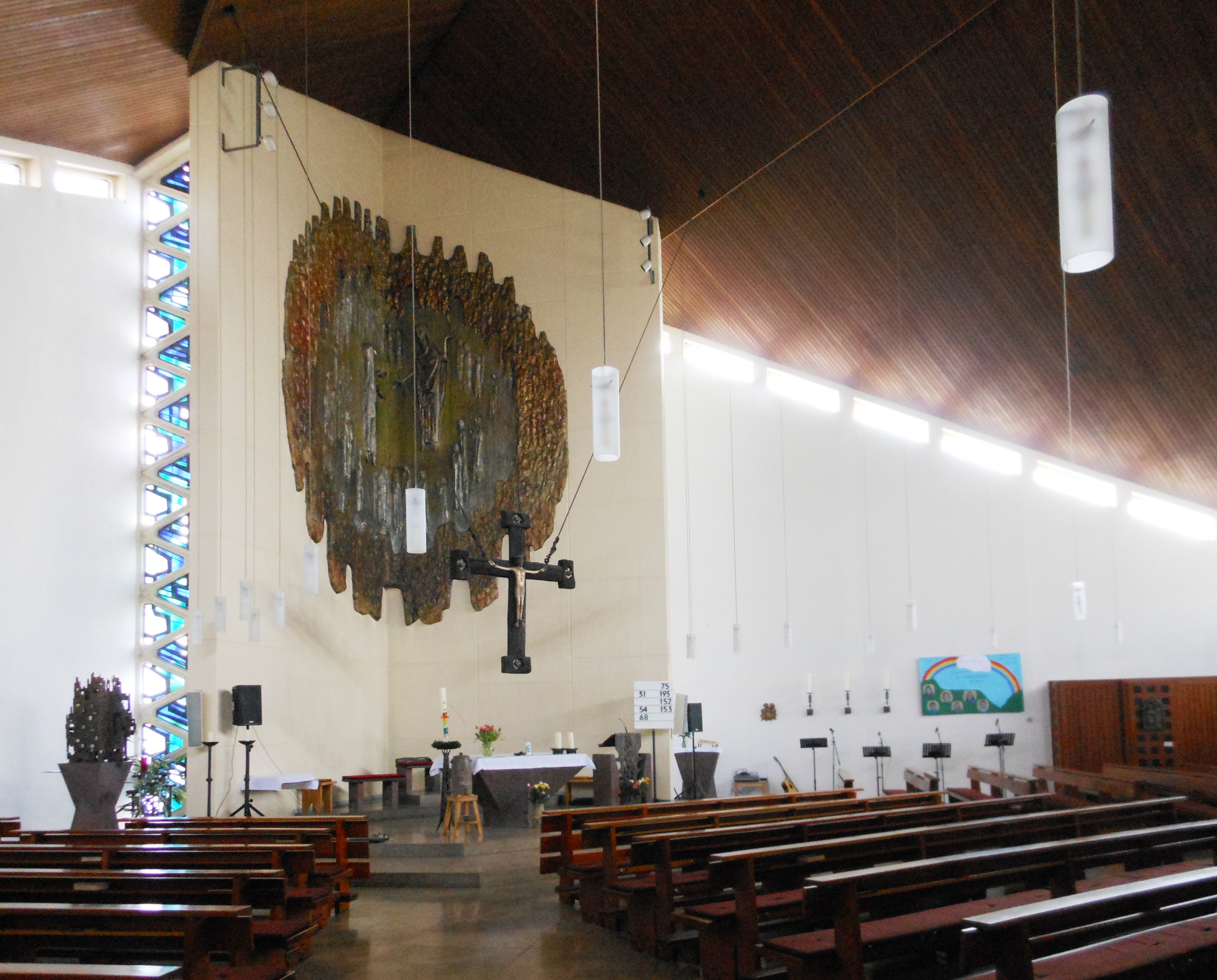 Hohnhorst-Scheller, kath. Kirche St. Petrus Canisius